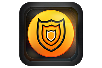 Icona del tojan falso antivirus Advanced System Protector